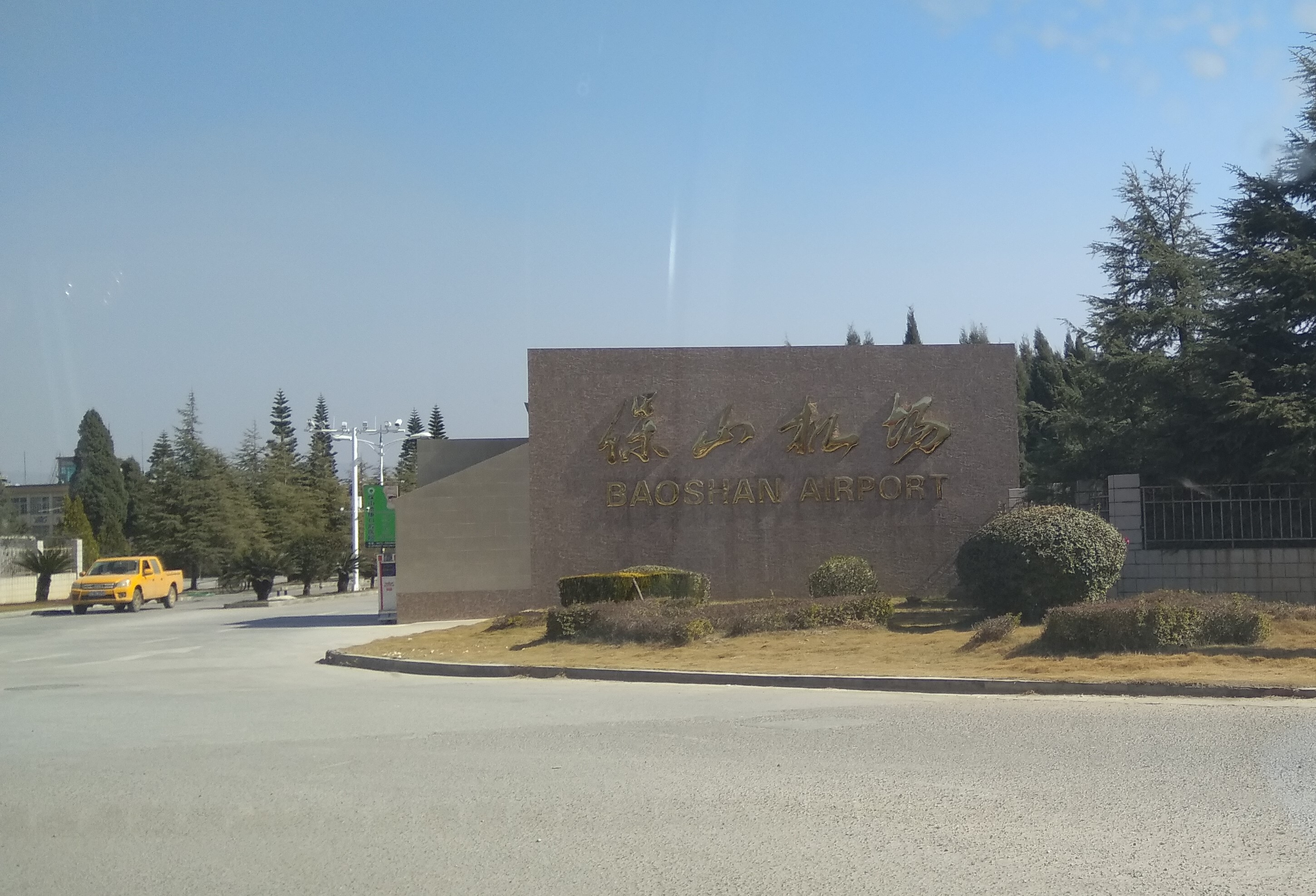 中文（中国大陆）: 保山机场入口